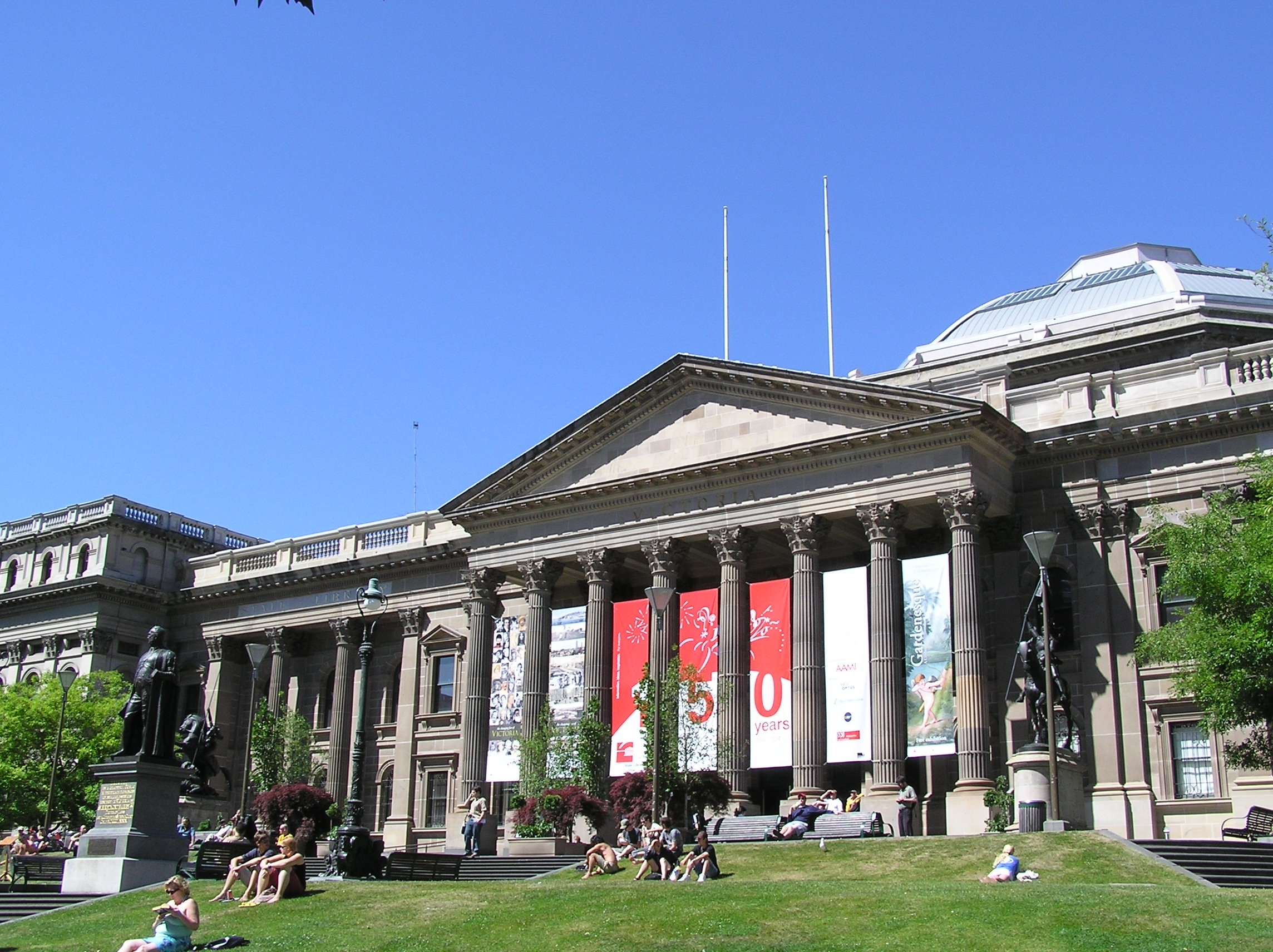 Průčelí státní knihovny ve Victorii